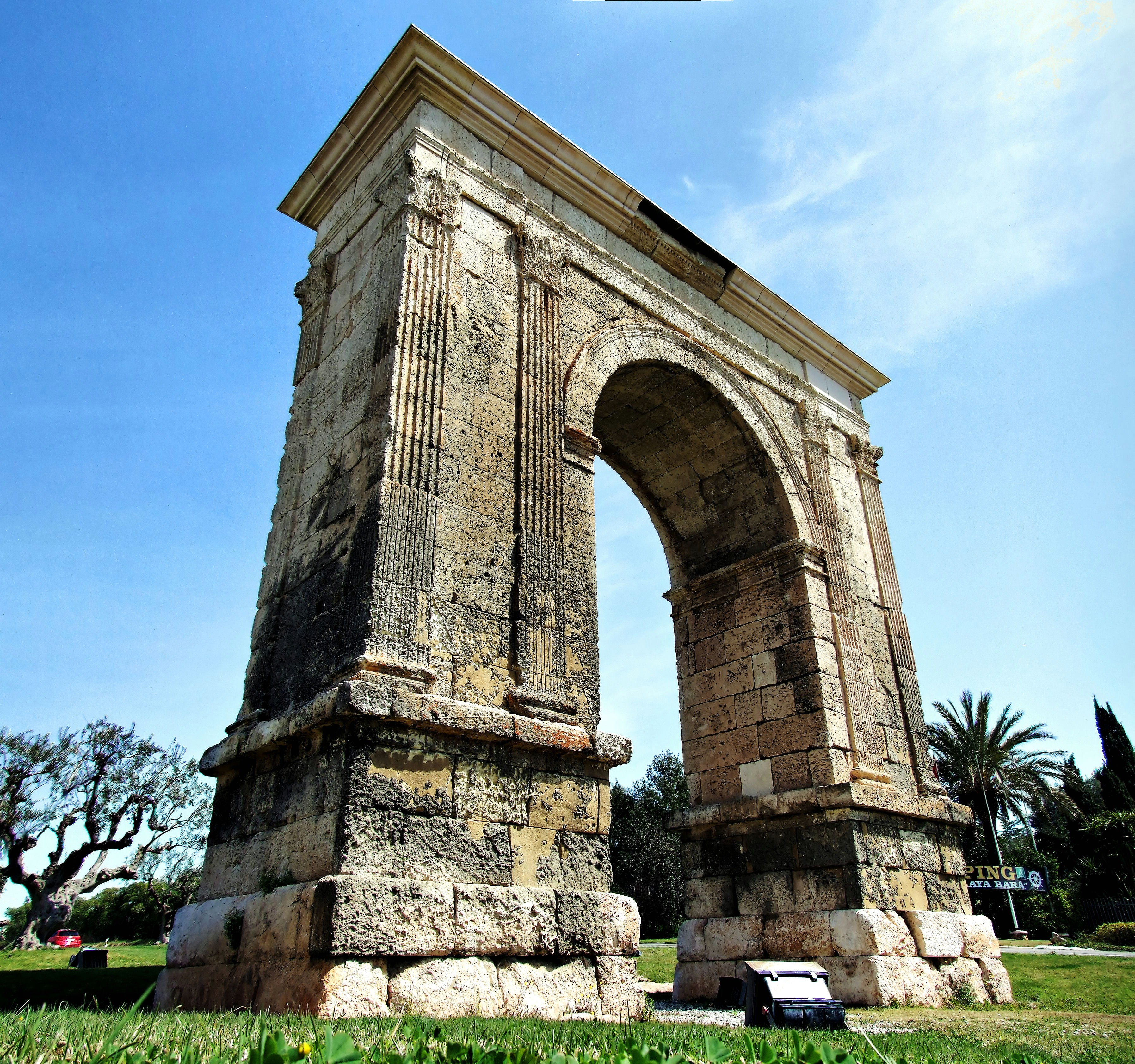 Arc de Berà (Roda de Barà)